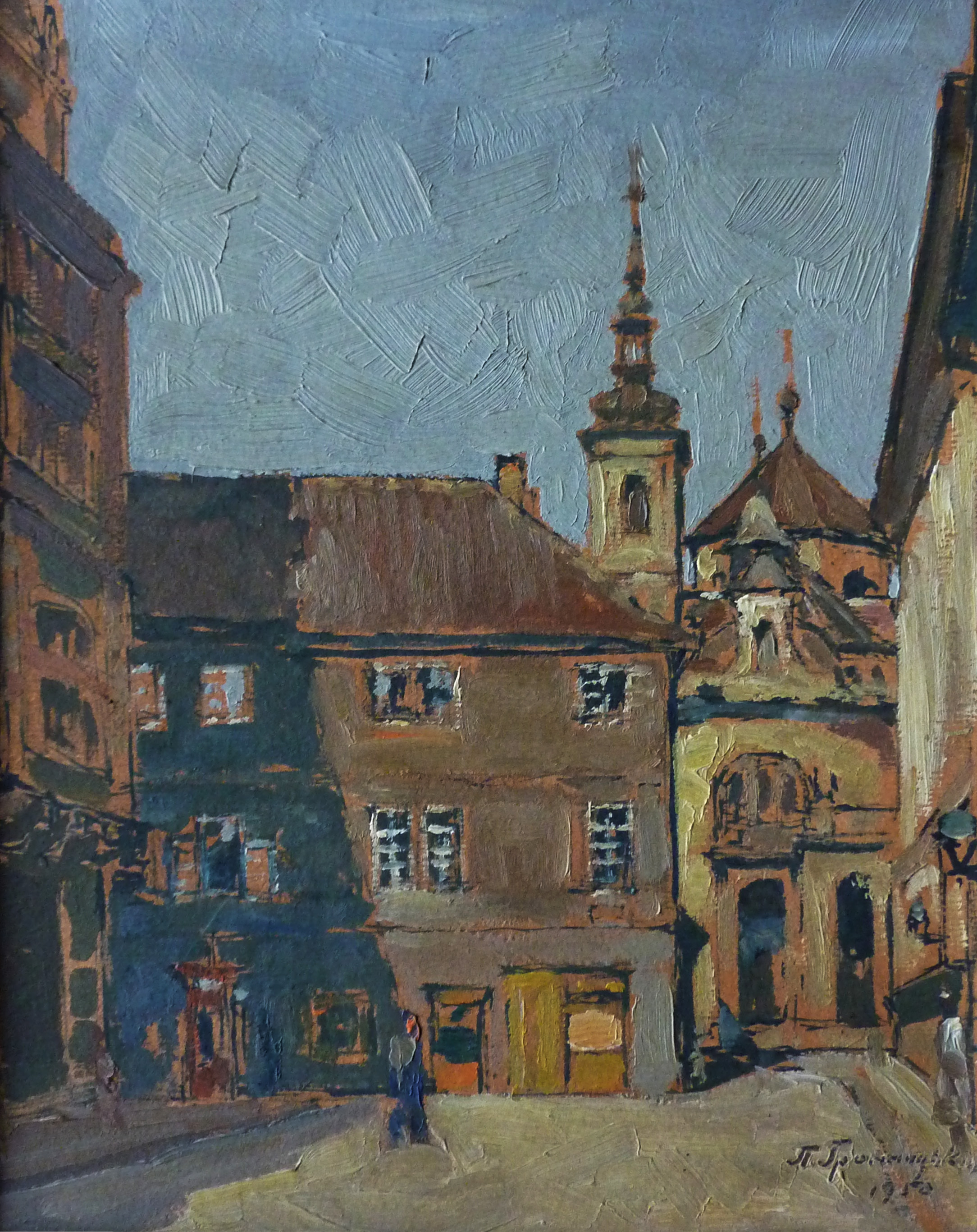 Obraz Pavla Antonoviče Hromnického